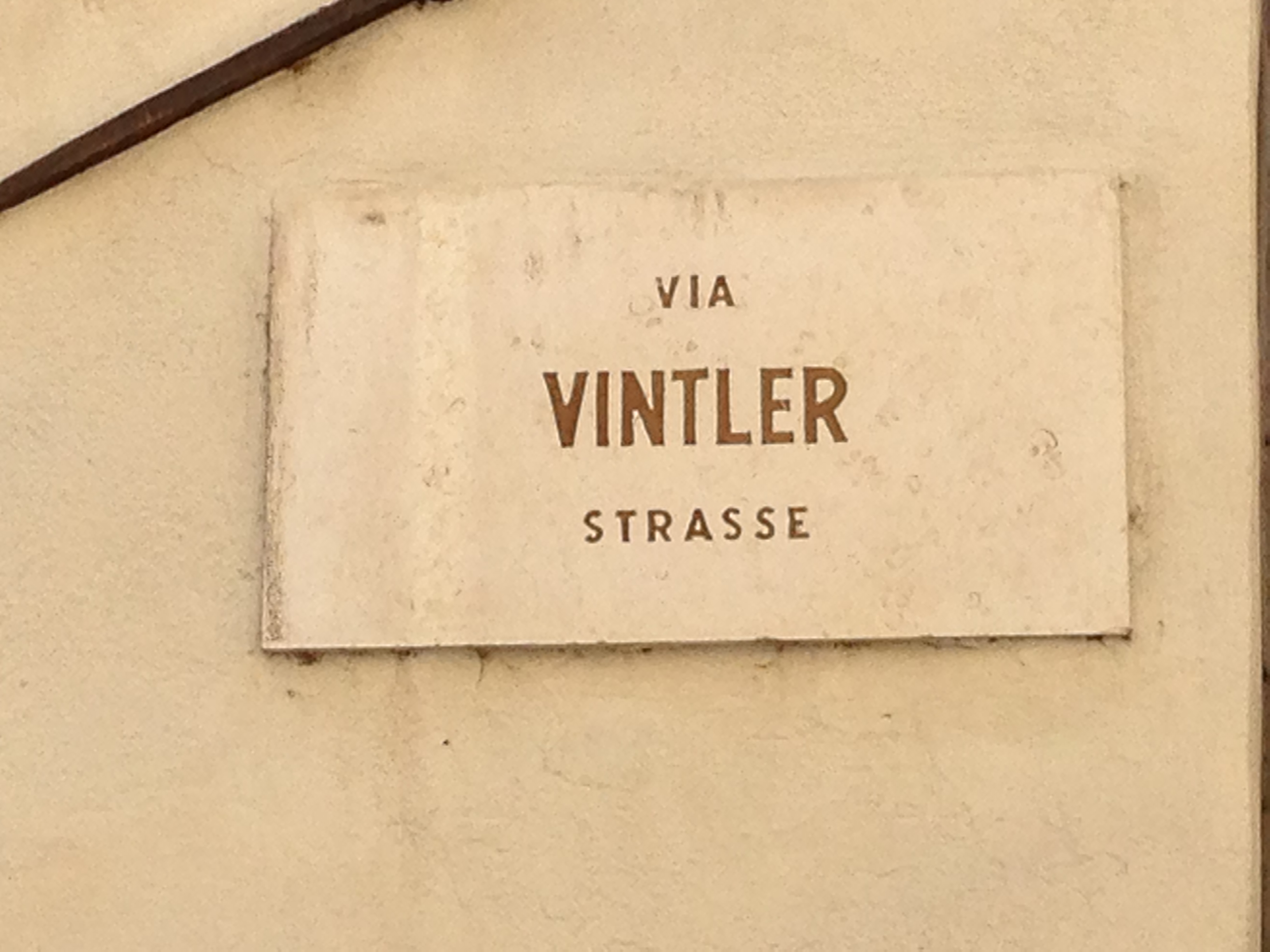 Vintlerstraße Via Vintler in Bozen Südtirol